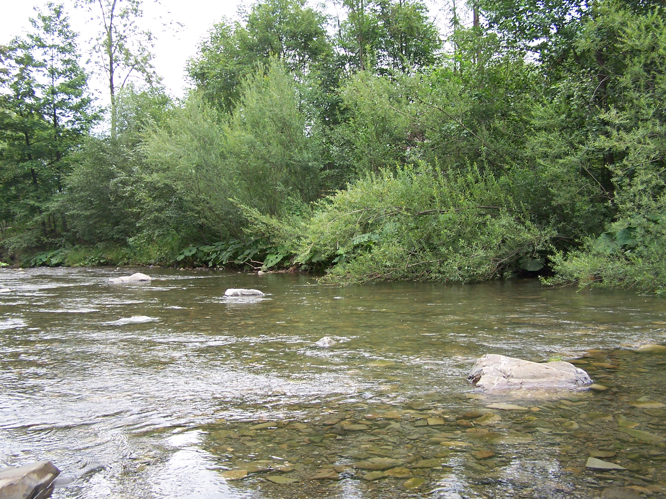 Lomná (Łomna) River in Dolní Lomná (Łomna Dolna), Beskids, Czech Republic